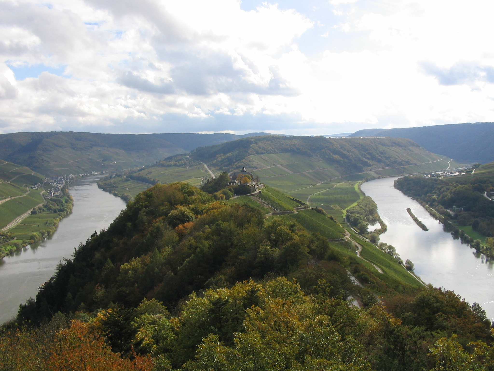 Die Marienburg an der Mosel in ihrer Umgebung